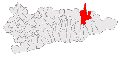 Categorie:Hărţi ale judeţului Călăraşi